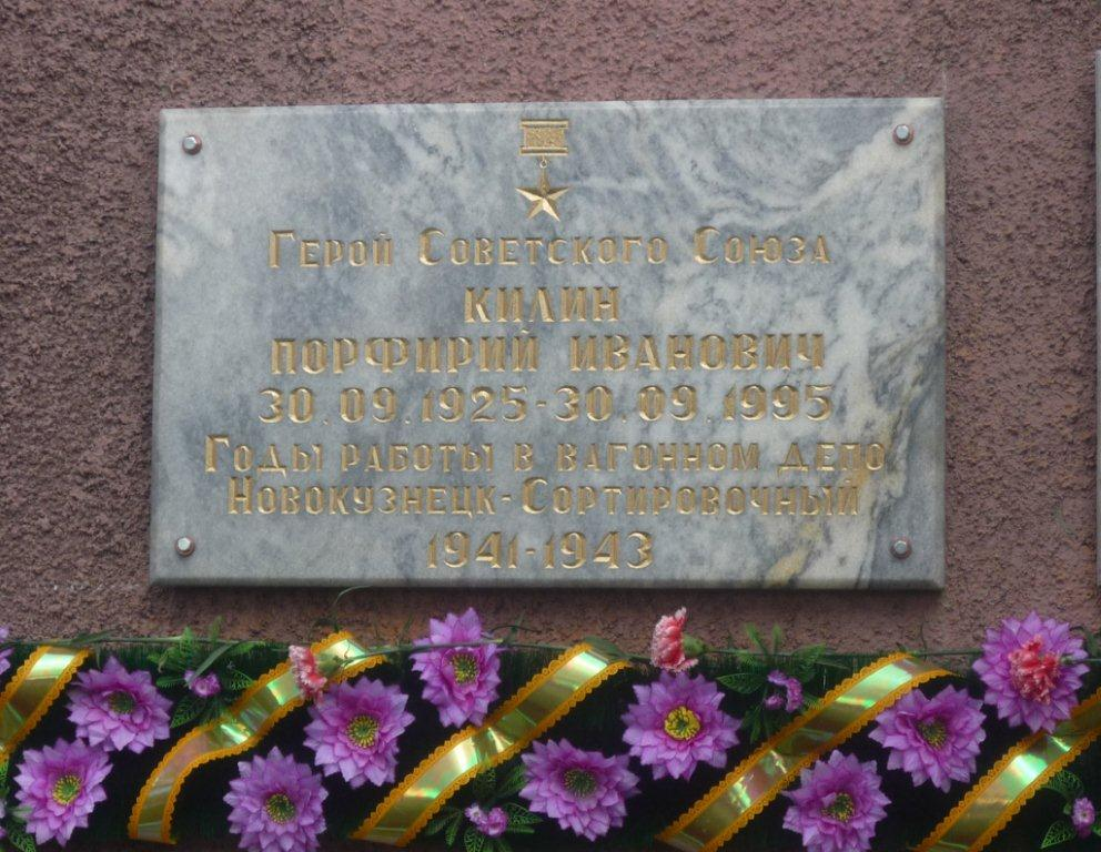 Мемориальная доска Килину П И